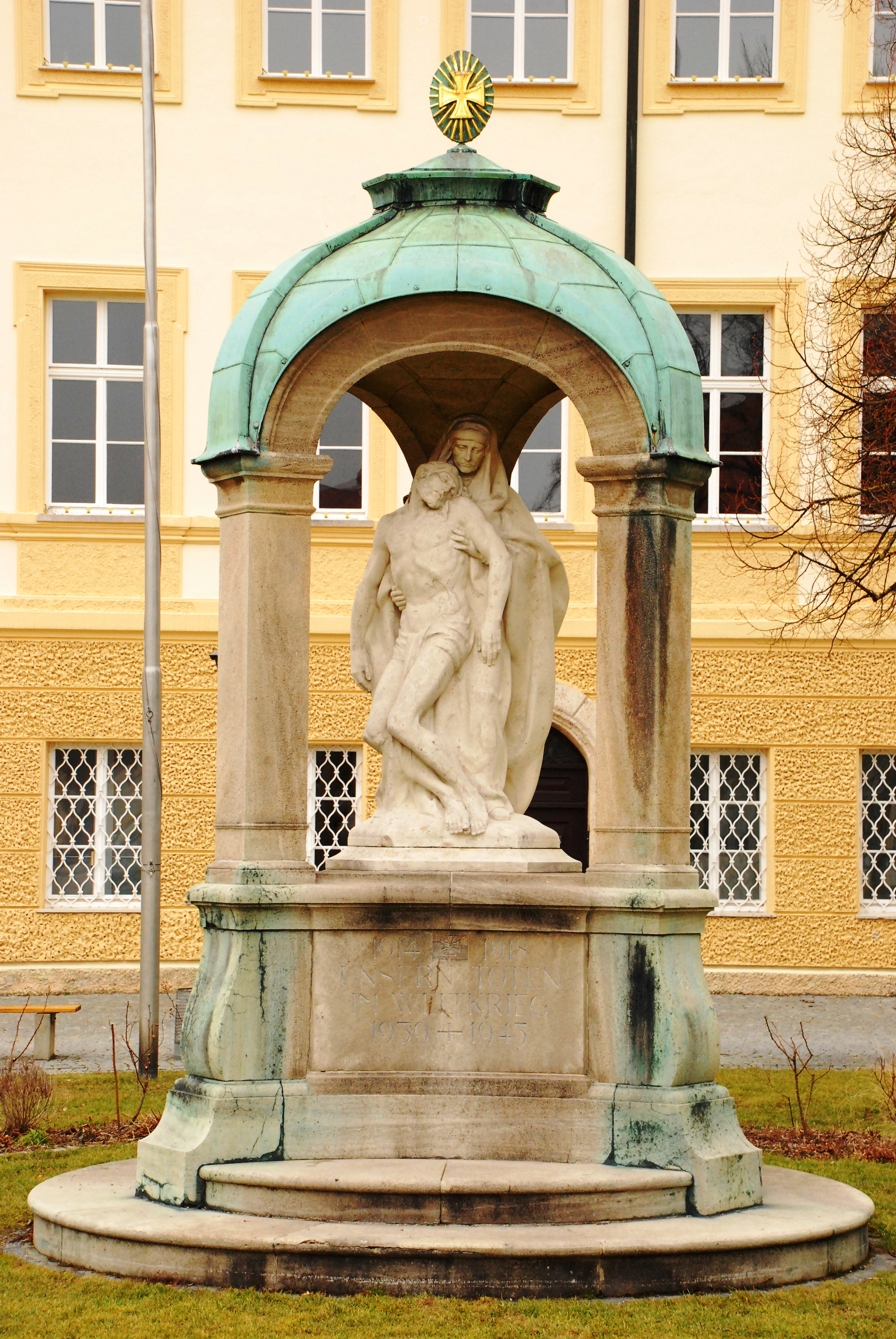 Kriegerdenkmal zur Erinnerung an die Gefallenen des Ersten Weltkriegs auf dem Kapellplatz in Altötting, Landkreis Altötting, Regierungsbezirk Oberbayern, Bayern. Als Baudenkmal unter Aktennummer D-1-71-111-85 in der Bayerischen Denkmalliste aufgeführt. Laut Denkmalliste erschaffen von Franz Hoser.